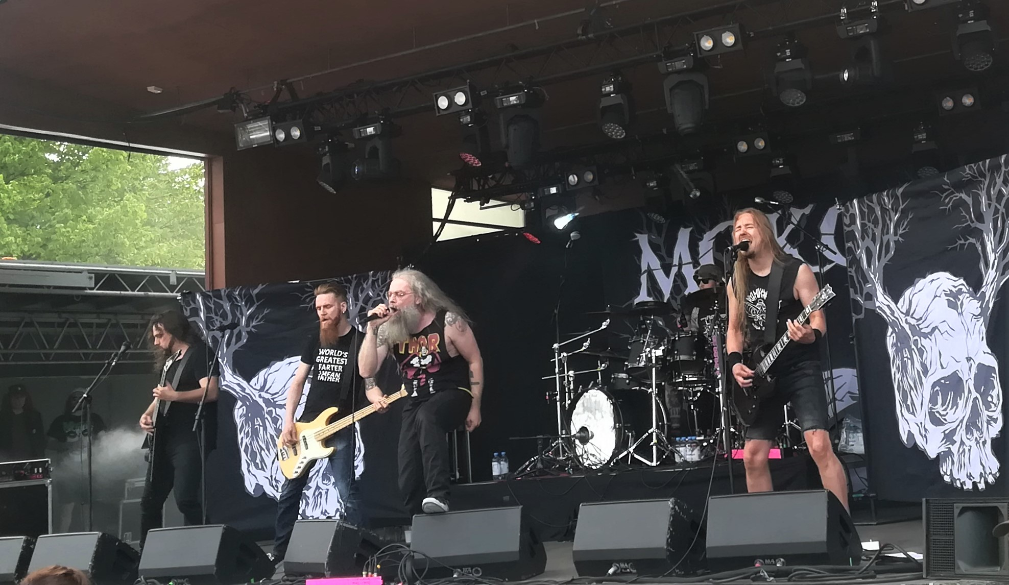 Mokoma vuonna 2019.